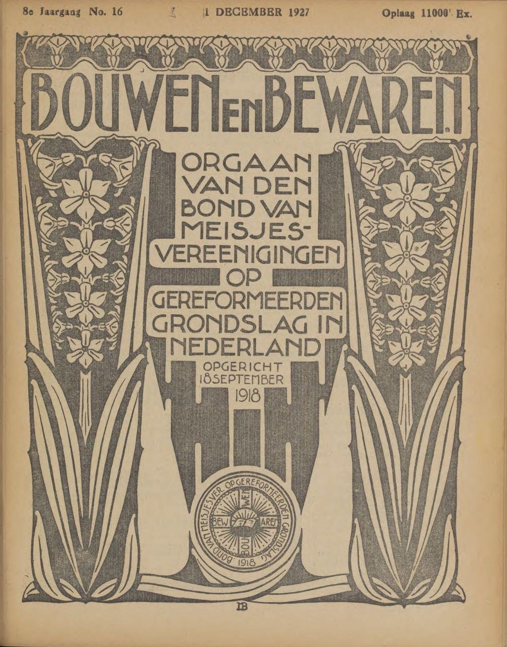 Omslag (1927) van Bouwen en bewaren Orgaan van den Bond van Meisjesvereenigingen op Gereformeerden Grondslag in Nederland. Vormgever niet bekend bij de uploader.